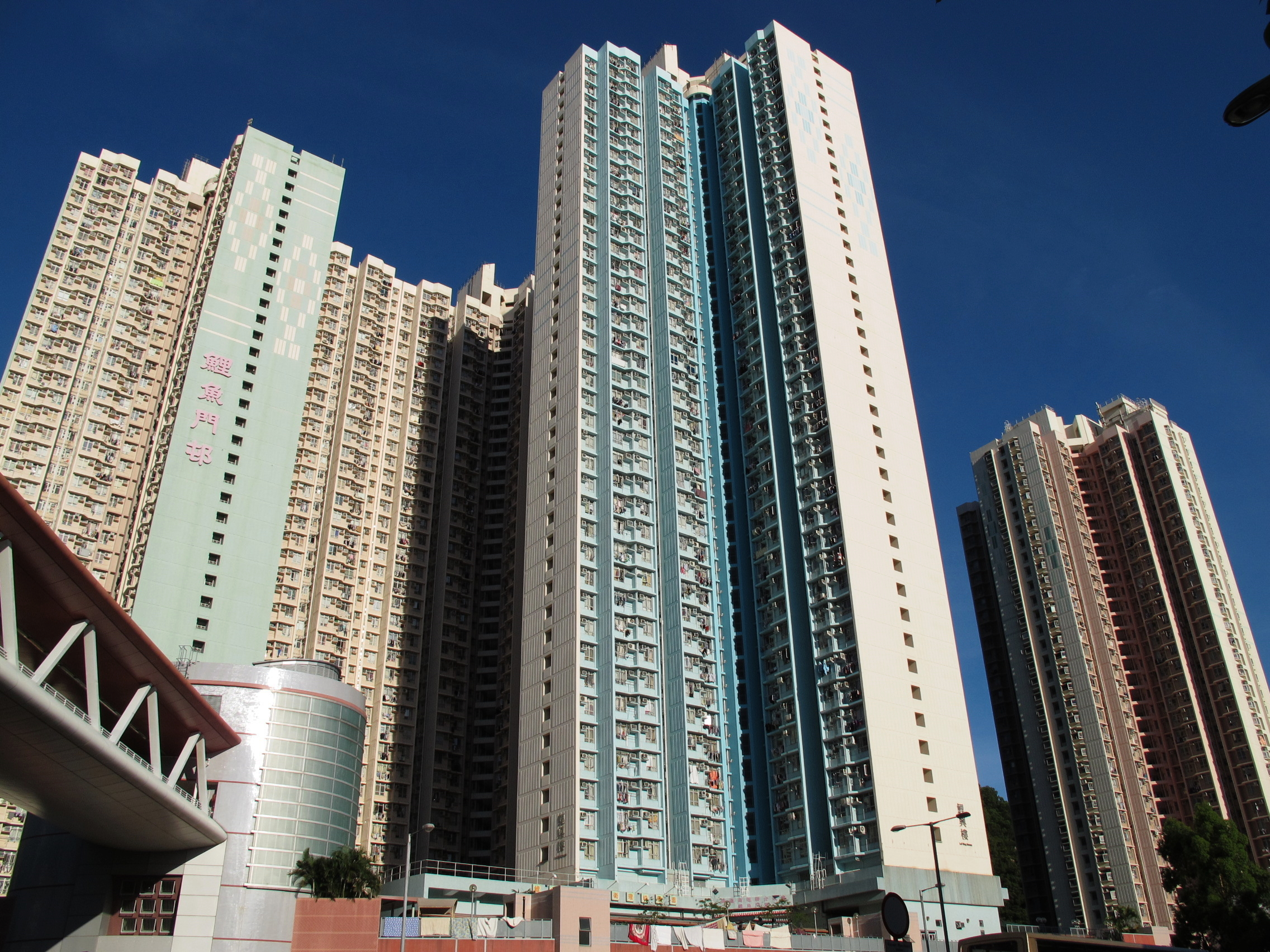 Lei Yue Mun Estate